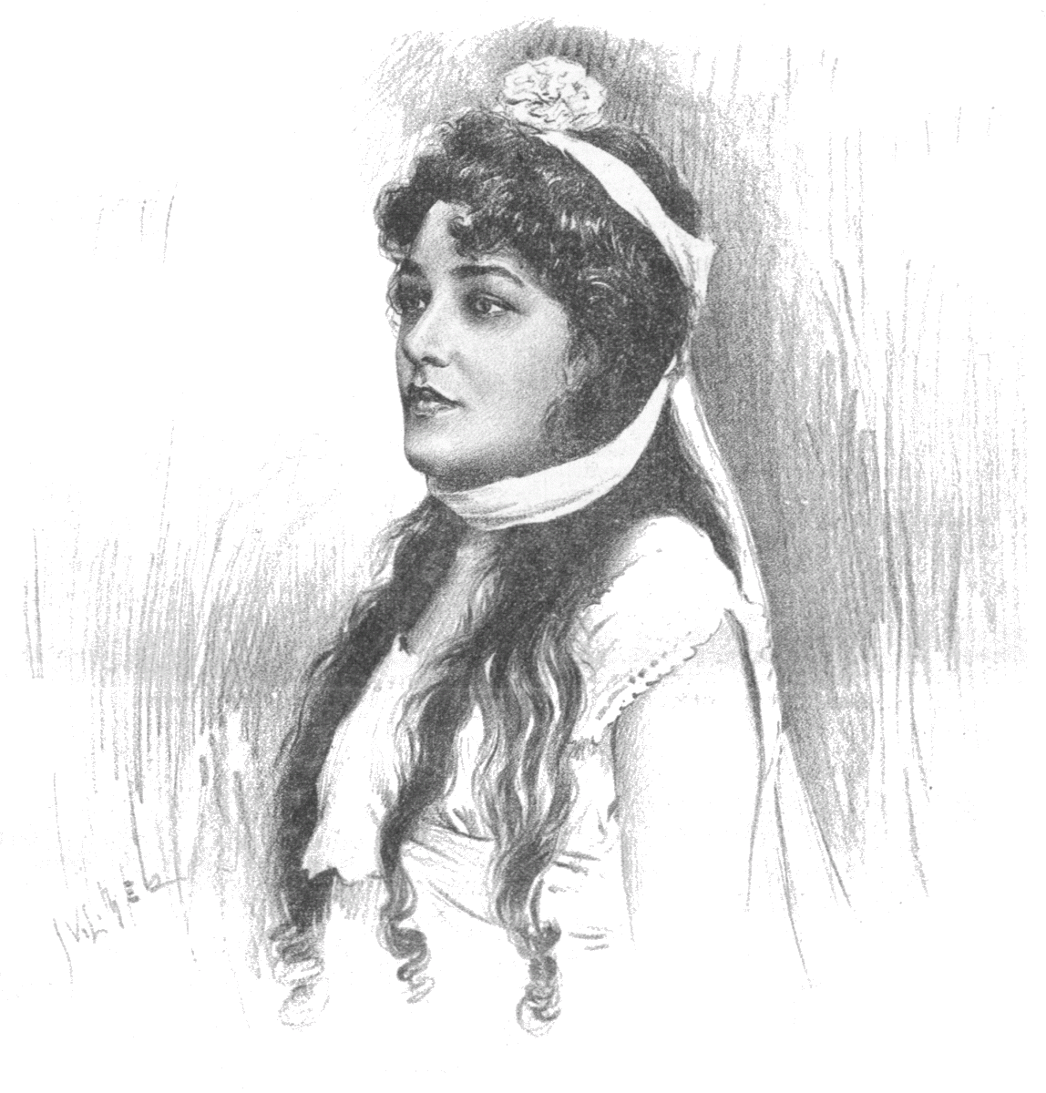 Tilla Durieux (1880-1971), Austrian actress